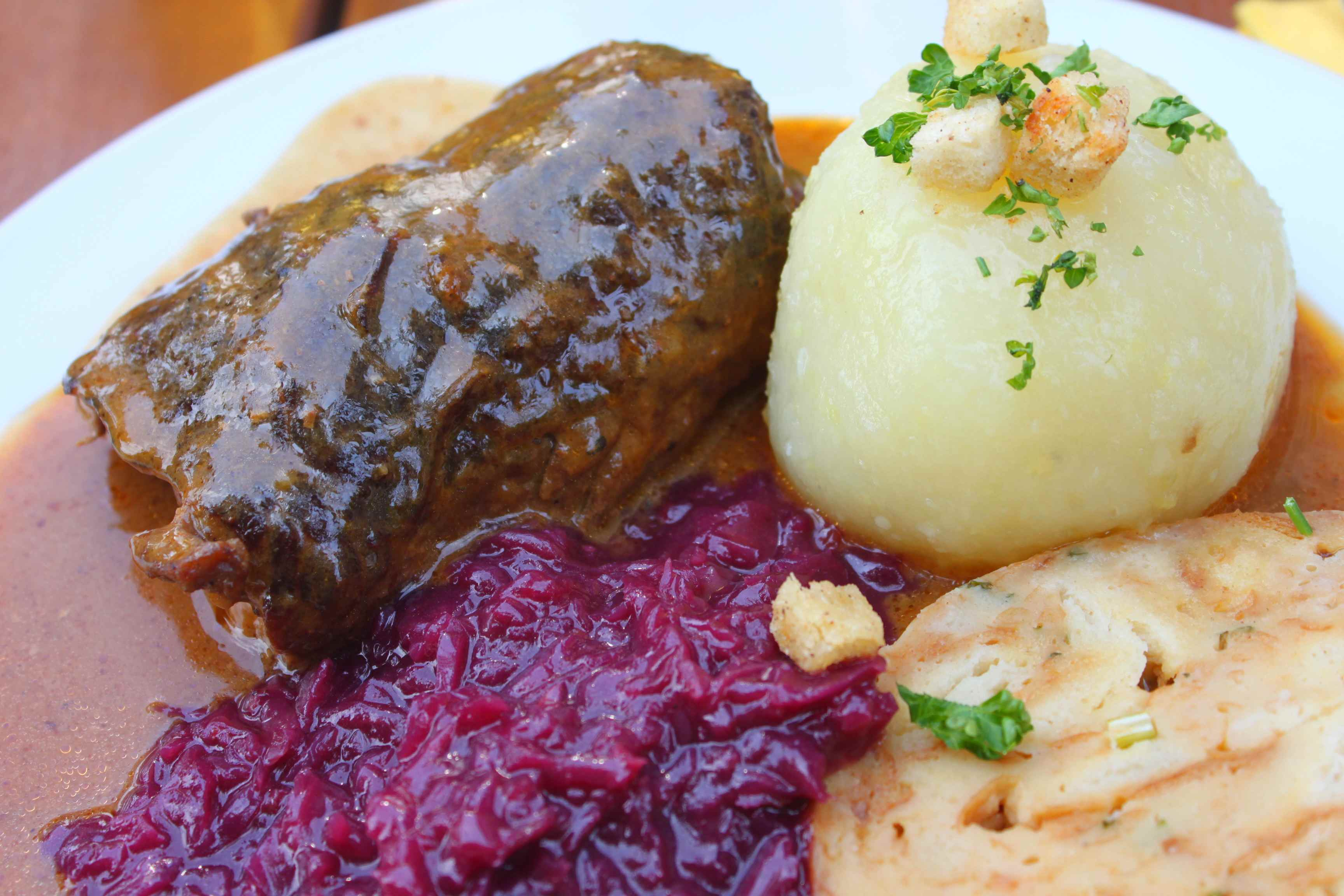 Rinderroulade mit Blaukraut und Semmel- und Kartoffelkloß